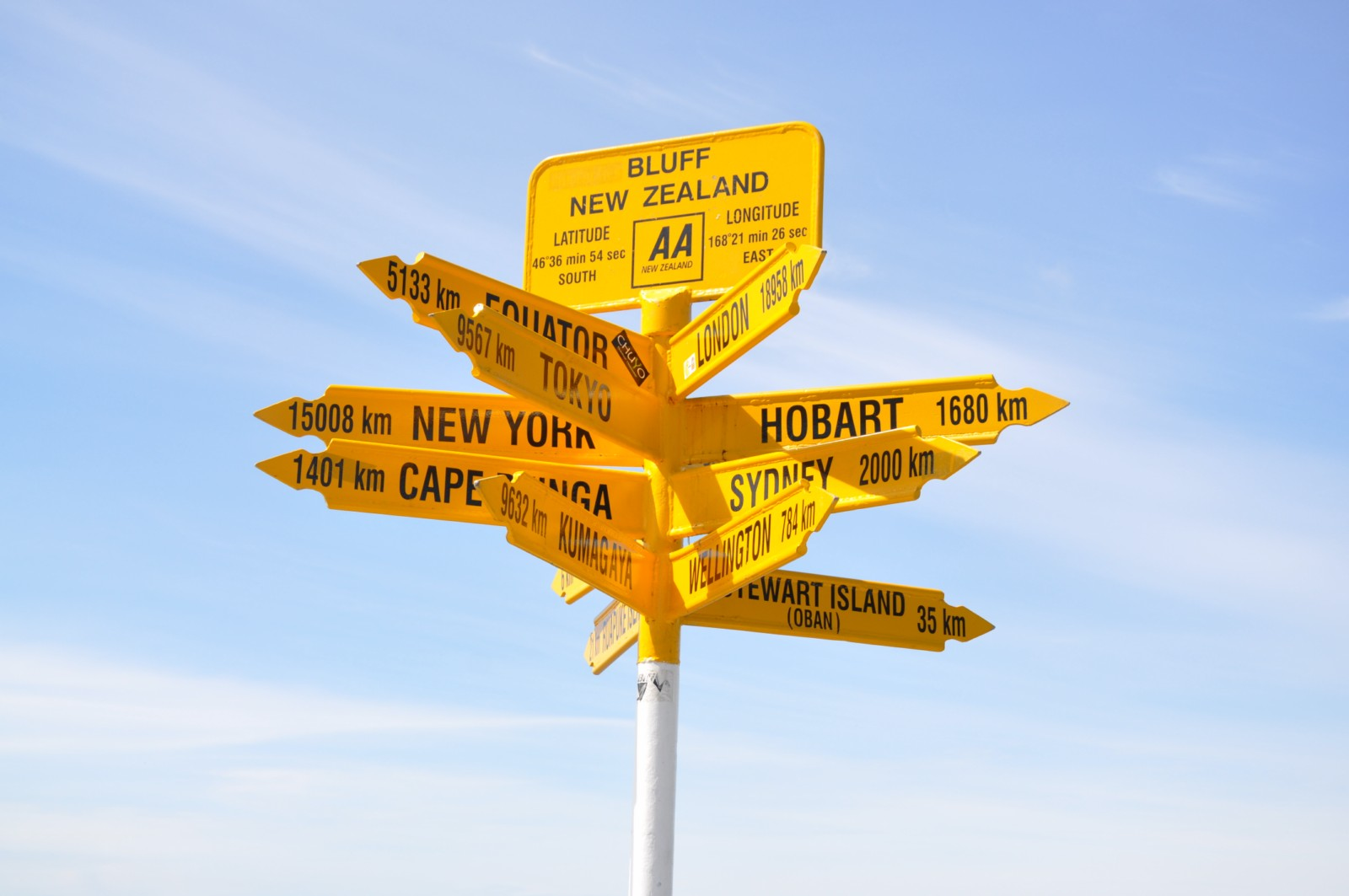 Panneau indicateur des distances à partir du Stirling Point de Bluff